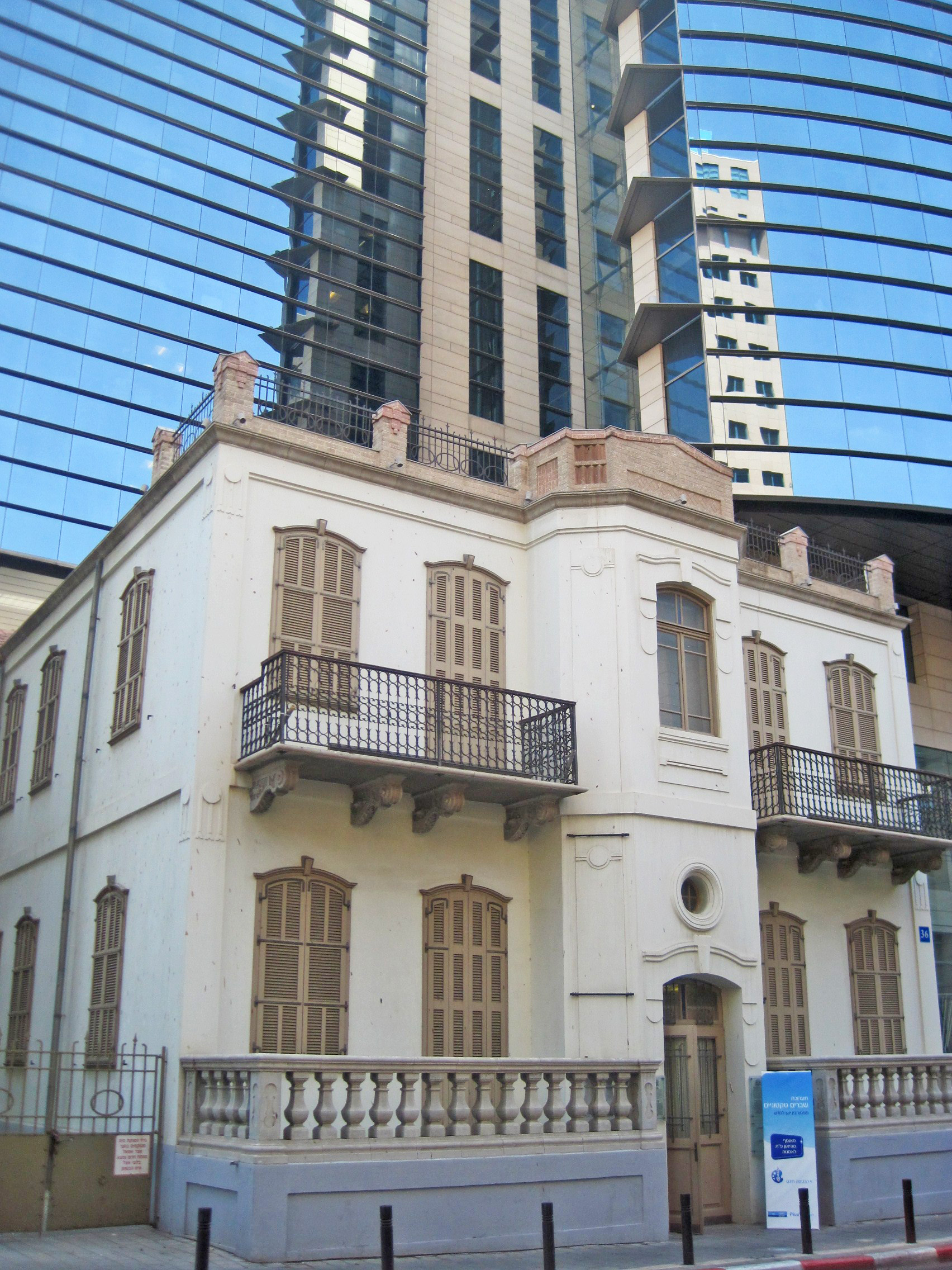 בית מני